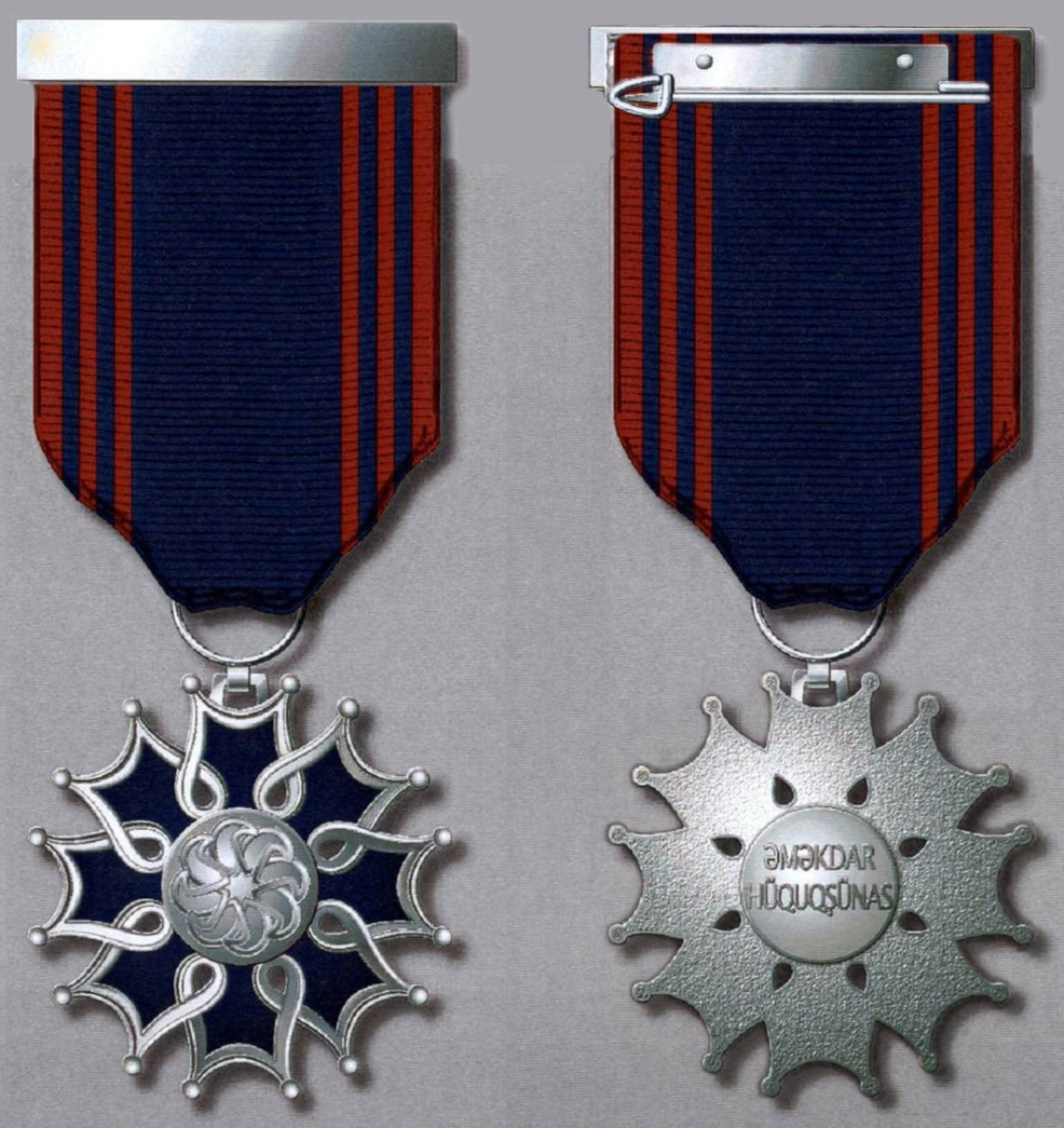 “Əməkdar hüquqşünas” fəxri adının döş nişanı